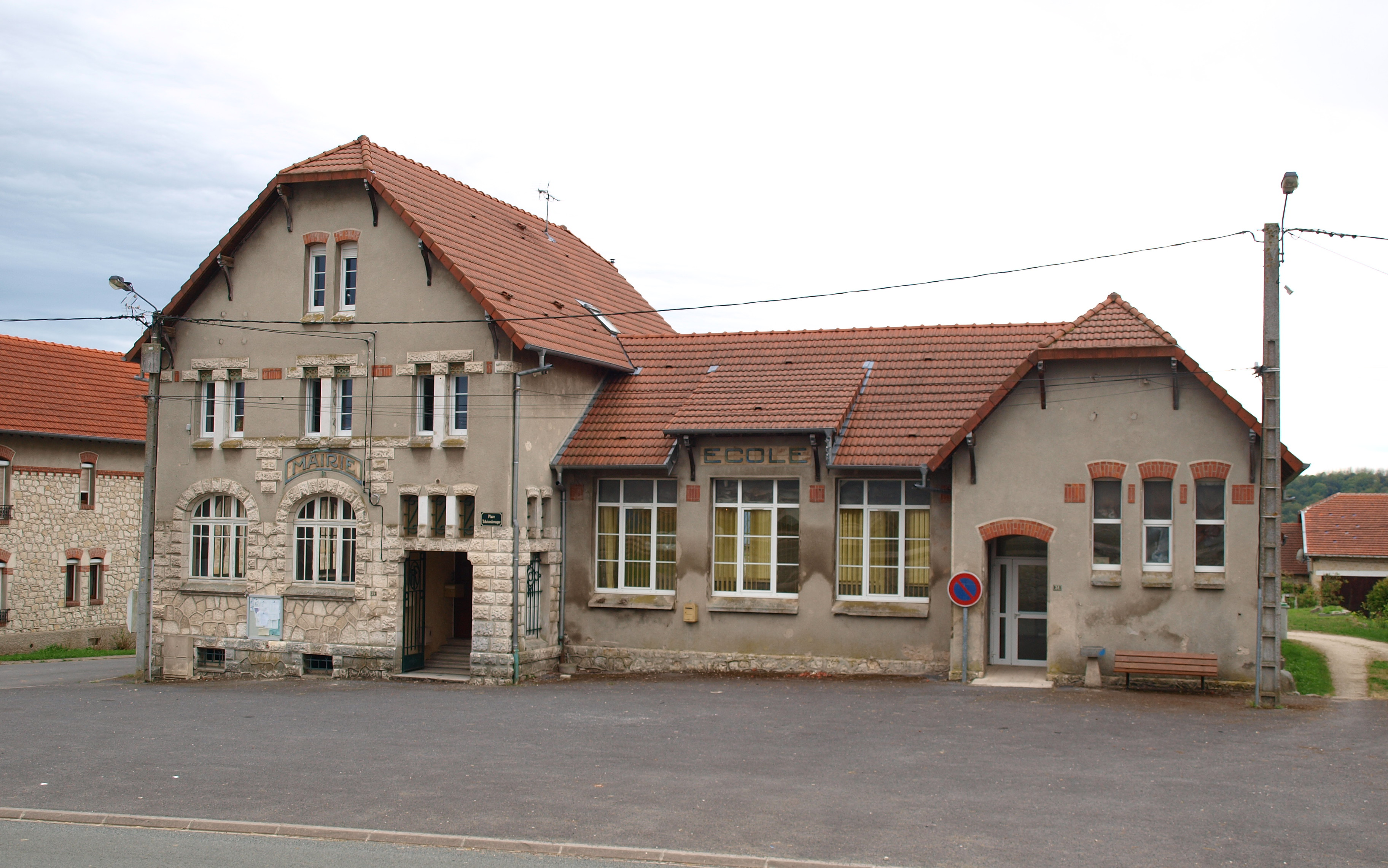 Terron-sur-Aisne (Ardennes, France) ; mairie